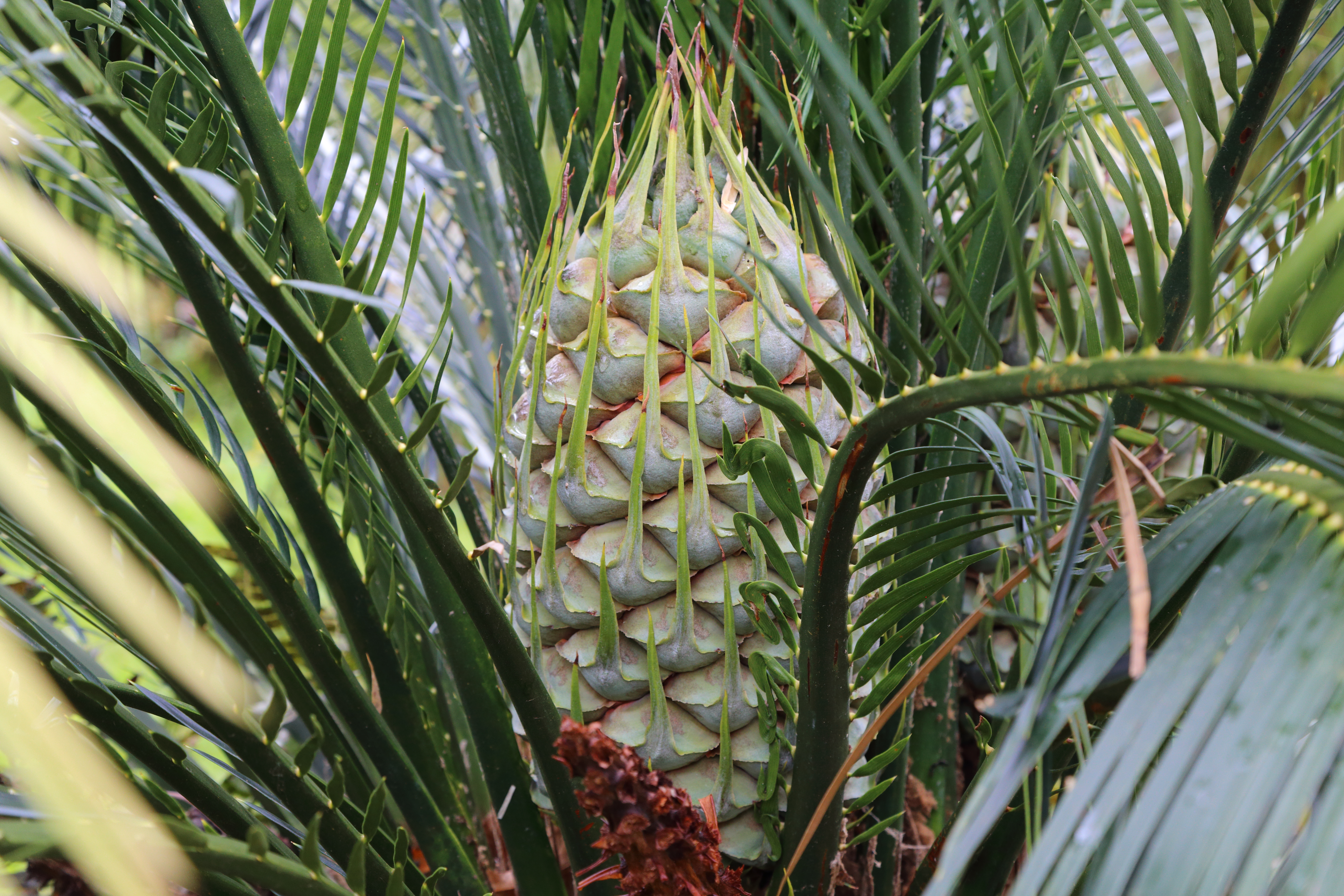 Macrozamia spiralis i parken Terra Nostra, Furnas, Azorerna.